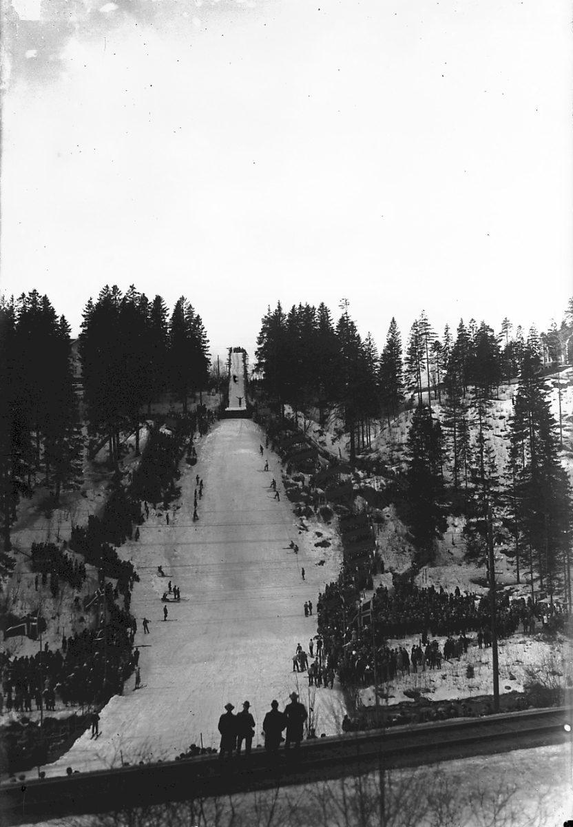 Hopprenn i Nydalsbakken, Oslo.